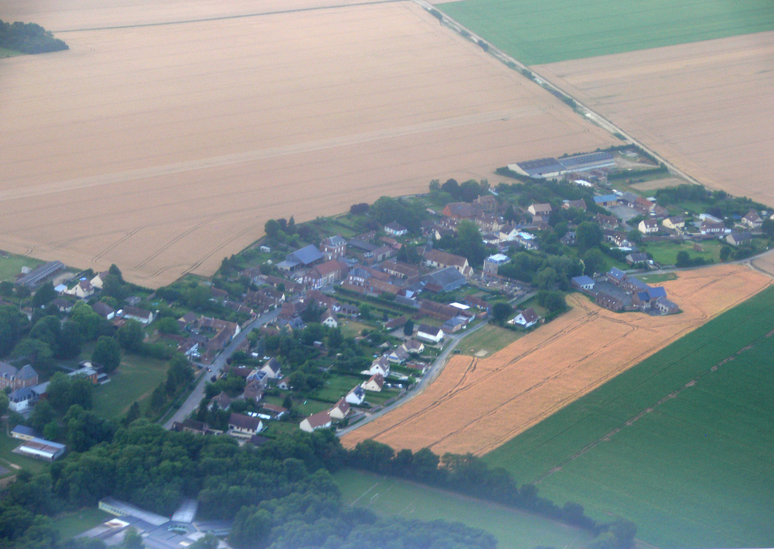 Vue aérienne de la commune de Nivillers (Oise)